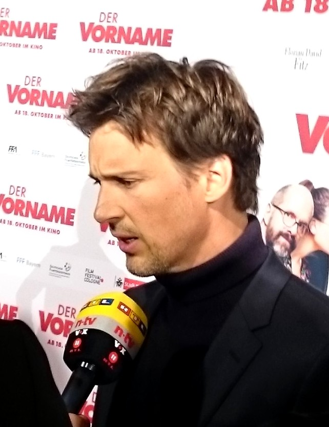 Florian David Fitz bei der Premiere des Filmes "Der Vorname", 2018 in Köln